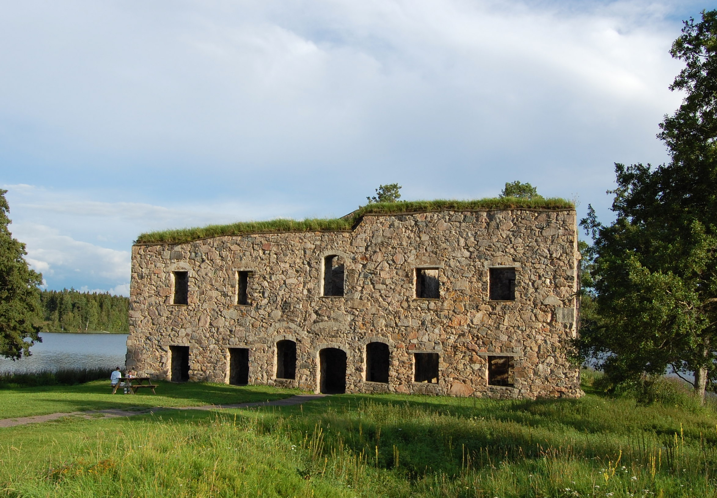 Nordseite der Schlossruine Eksjöhovgard